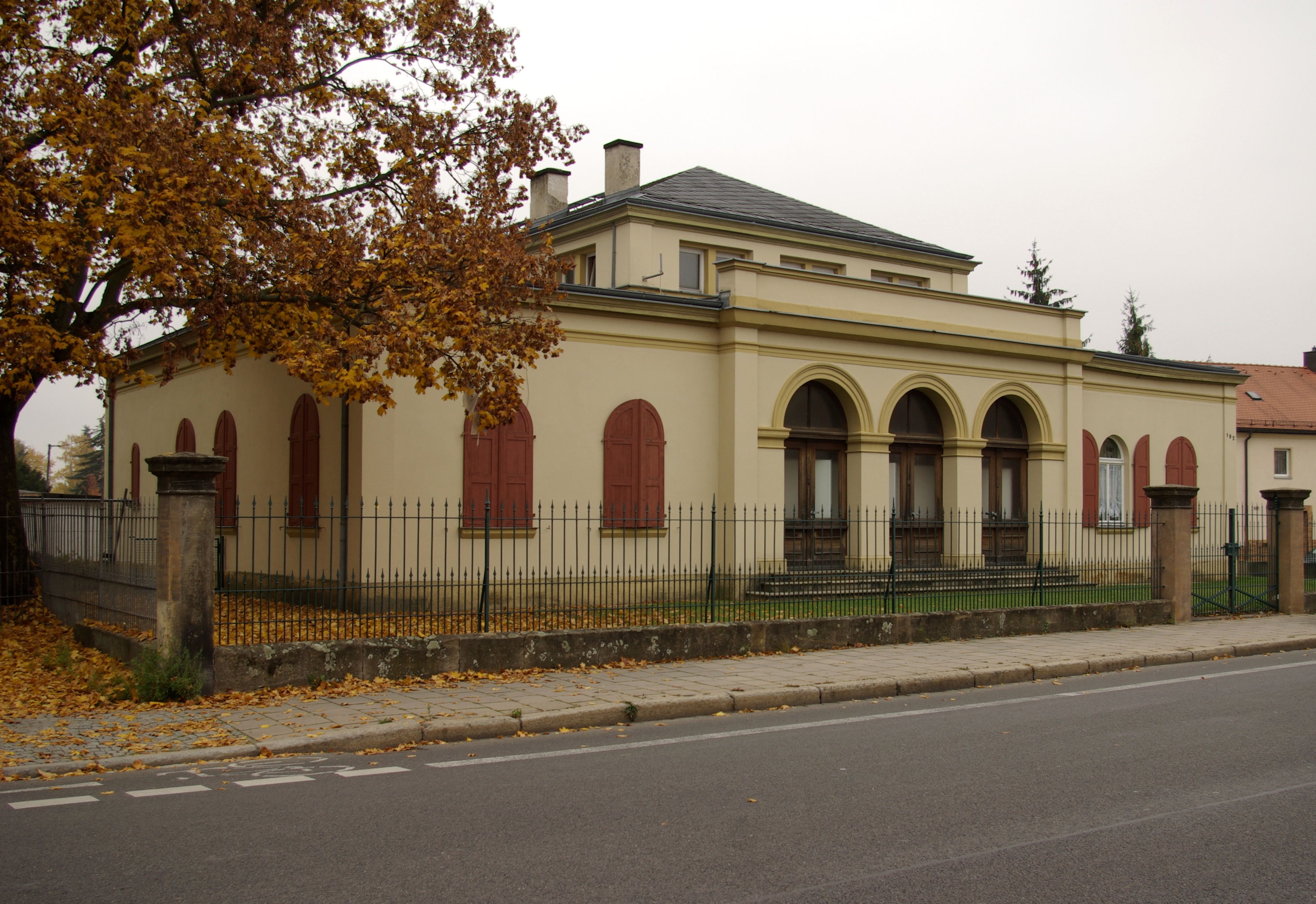 Trauerhalle des Jüdischen Friedhofs in Bamberg, Siechenstraße 102